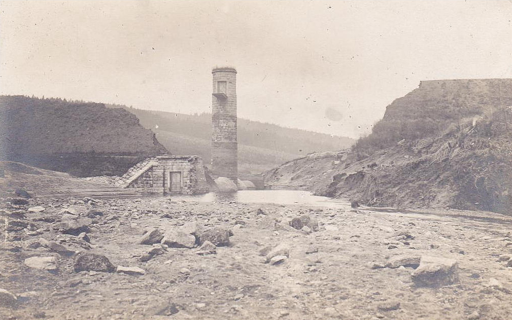 Přehrada na řece Desné po protržení dne 18. září 1916.